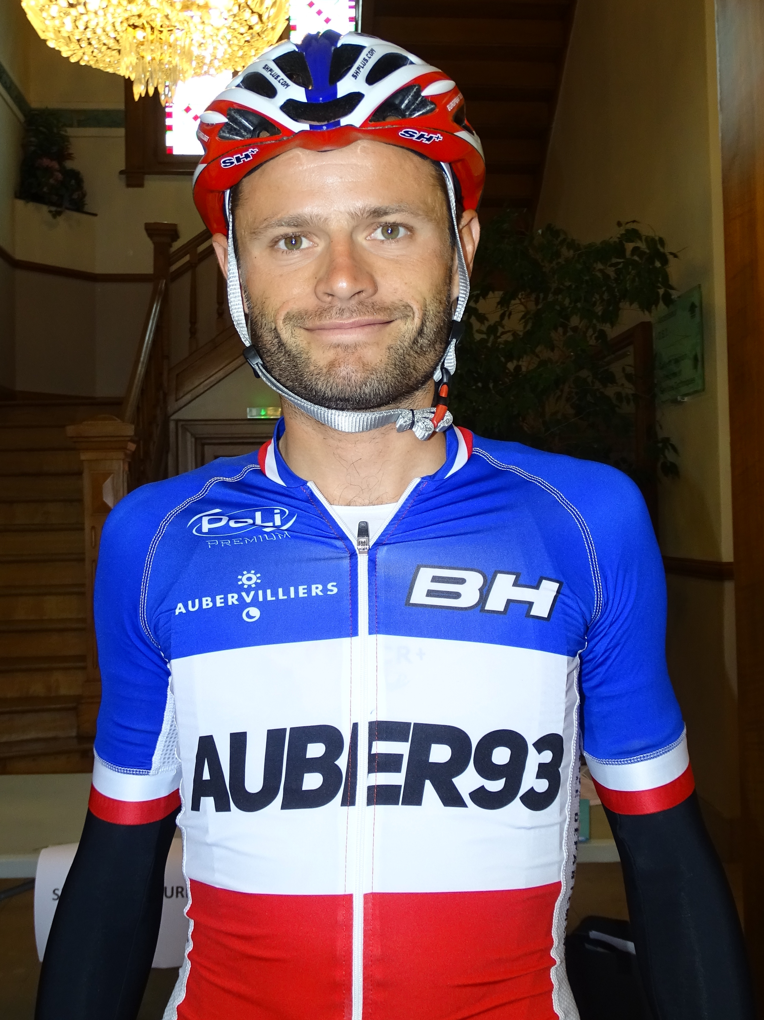 Reportage réalisé le dimanche 26 juillet à l'occasion du départ et de l'arrivée du Grand Prix de la ville de Pérenchies 2015 à Pérenchies, Nord, Nord-Pas-de-Calais, France.